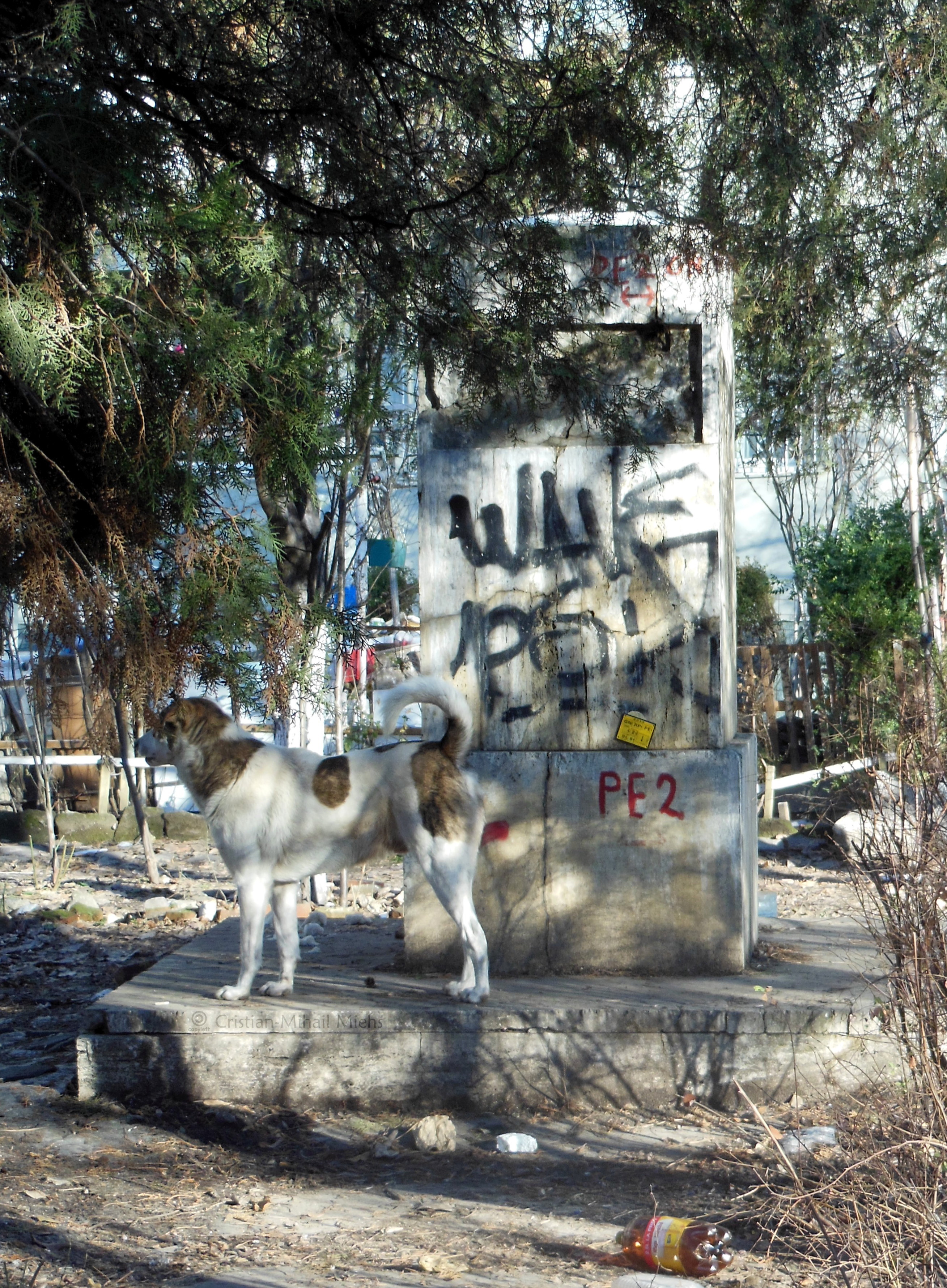 Soclul pe care, până în 1989, se afla bustul lui Alexandru Moghioroș